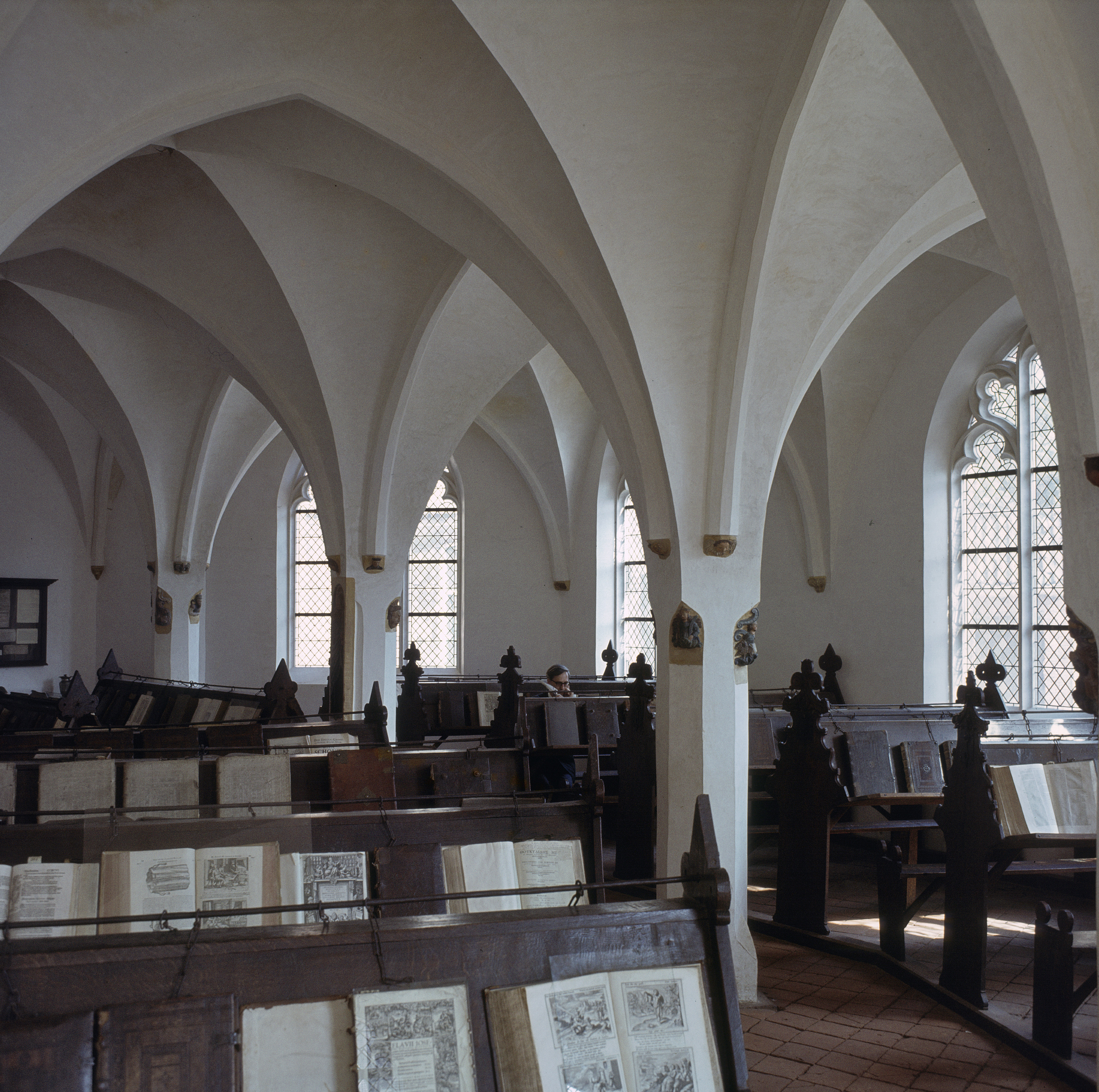 Grote - of Sint Walburgskerk: Interieur, overzicht librije met kruisgewelven